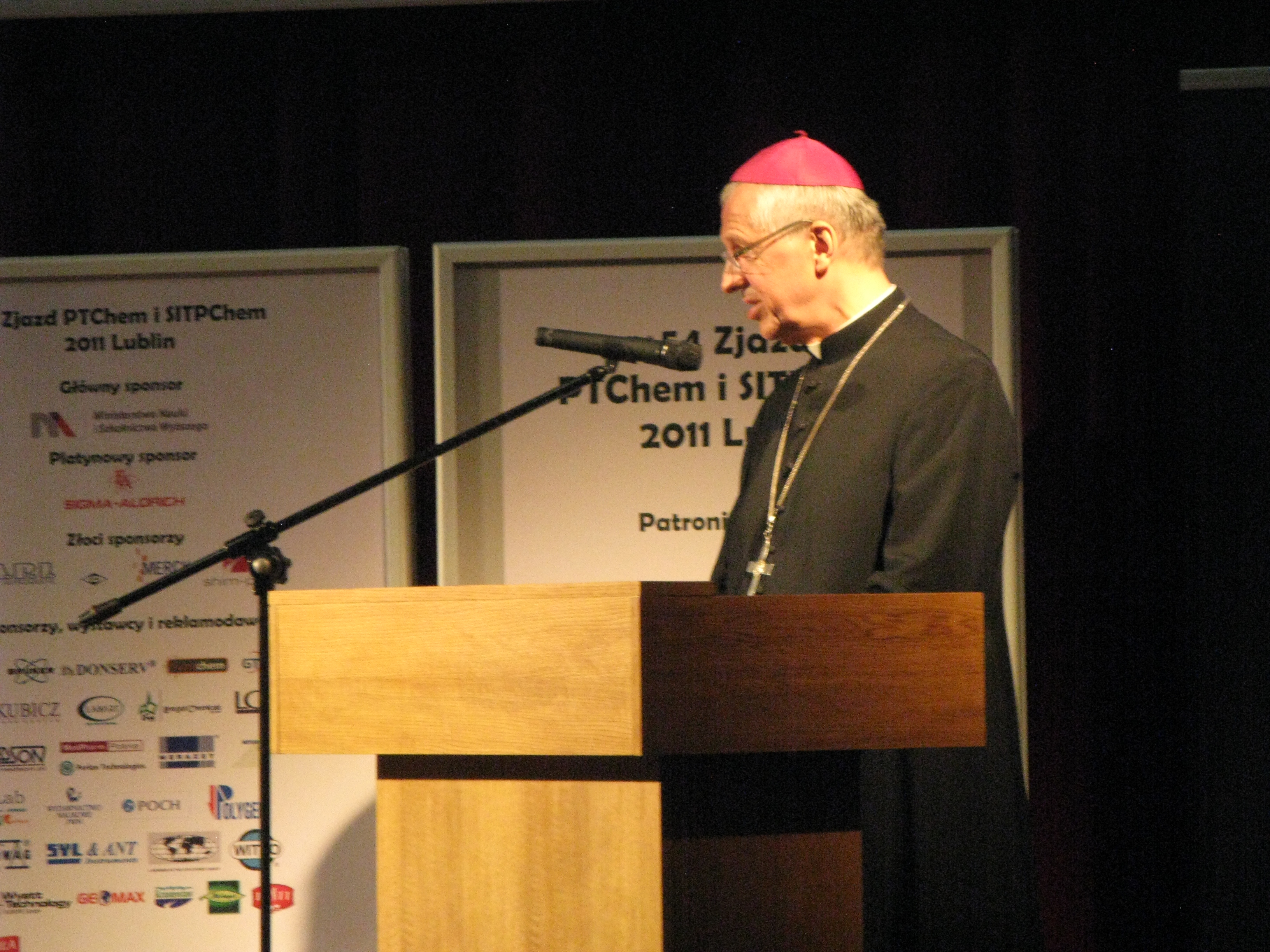 Biskup Mieczysław Cisło na otwarciu zjazdu PTChem w Lublinie